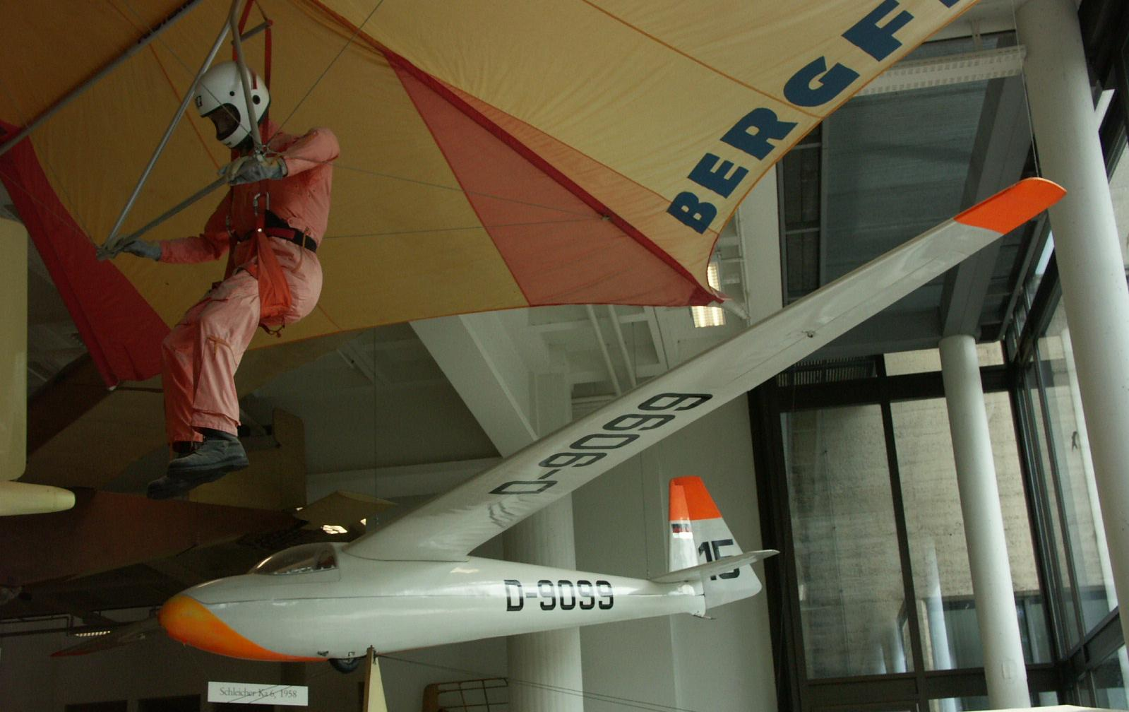 German Glider Schleicher Ka6 (1958) photo j-p donzey in Deutsches Museum Munich